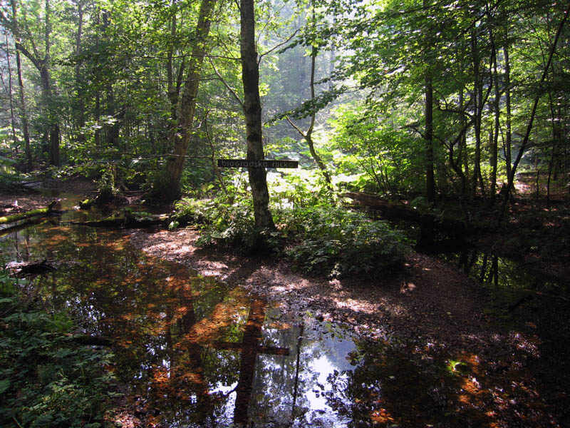 Biogradska gora